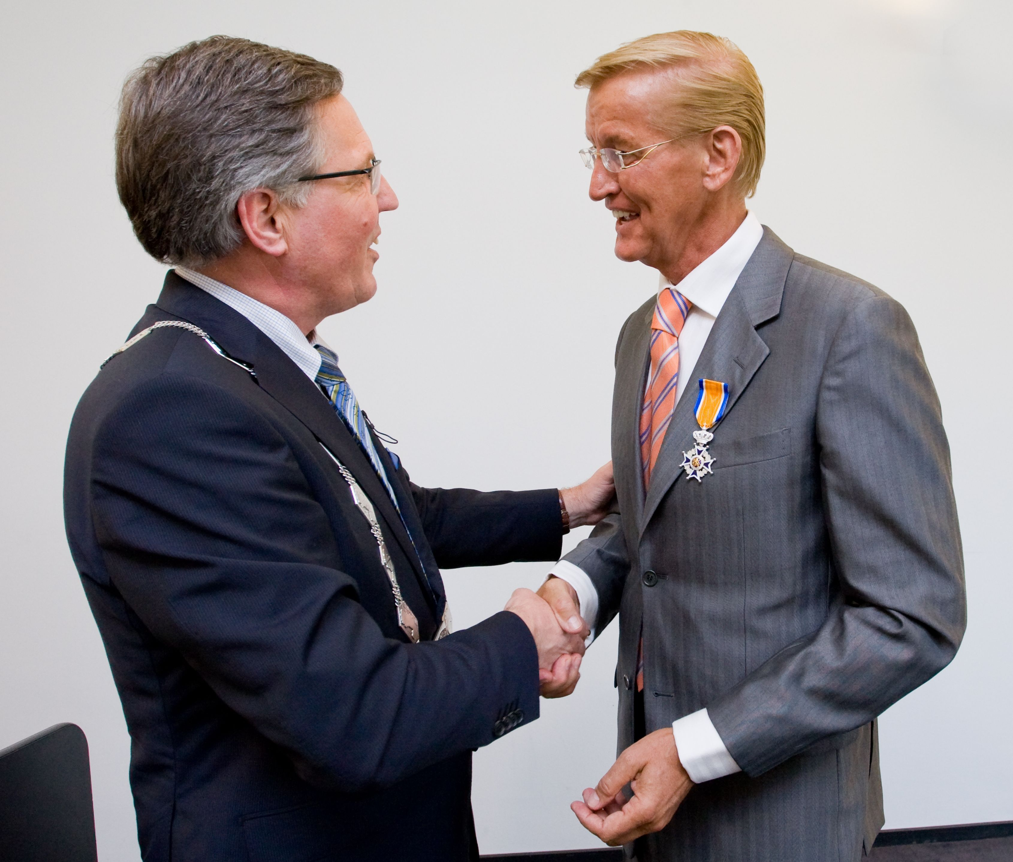 Jan van den Bosch, presentator van Hour of Power in Nederland, ontvangt in 2010 een hoge koninklijke onderscheiding (Ridder in de Orde van Oranje-Nassau) uit handen van burgemeester Gerard Rabelink van Schouwen-Duiveland